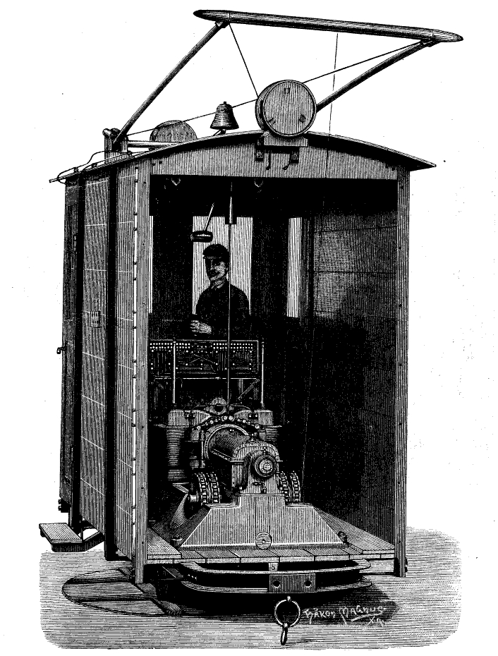 Lokomotive "Kasse" Skotfos brug (vor 1894)